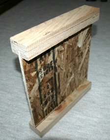 OSBを用いたI型梁